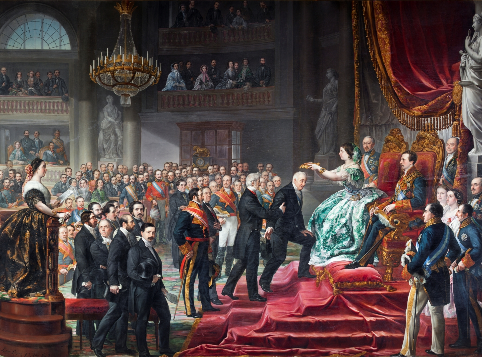 El lienzo representa la coronación del poeta español Manuel José Quintana (1772-1857), por la reina Isabel II de España, siendo celebrado dicho acto en el Palacio del Senado de España en 1855.